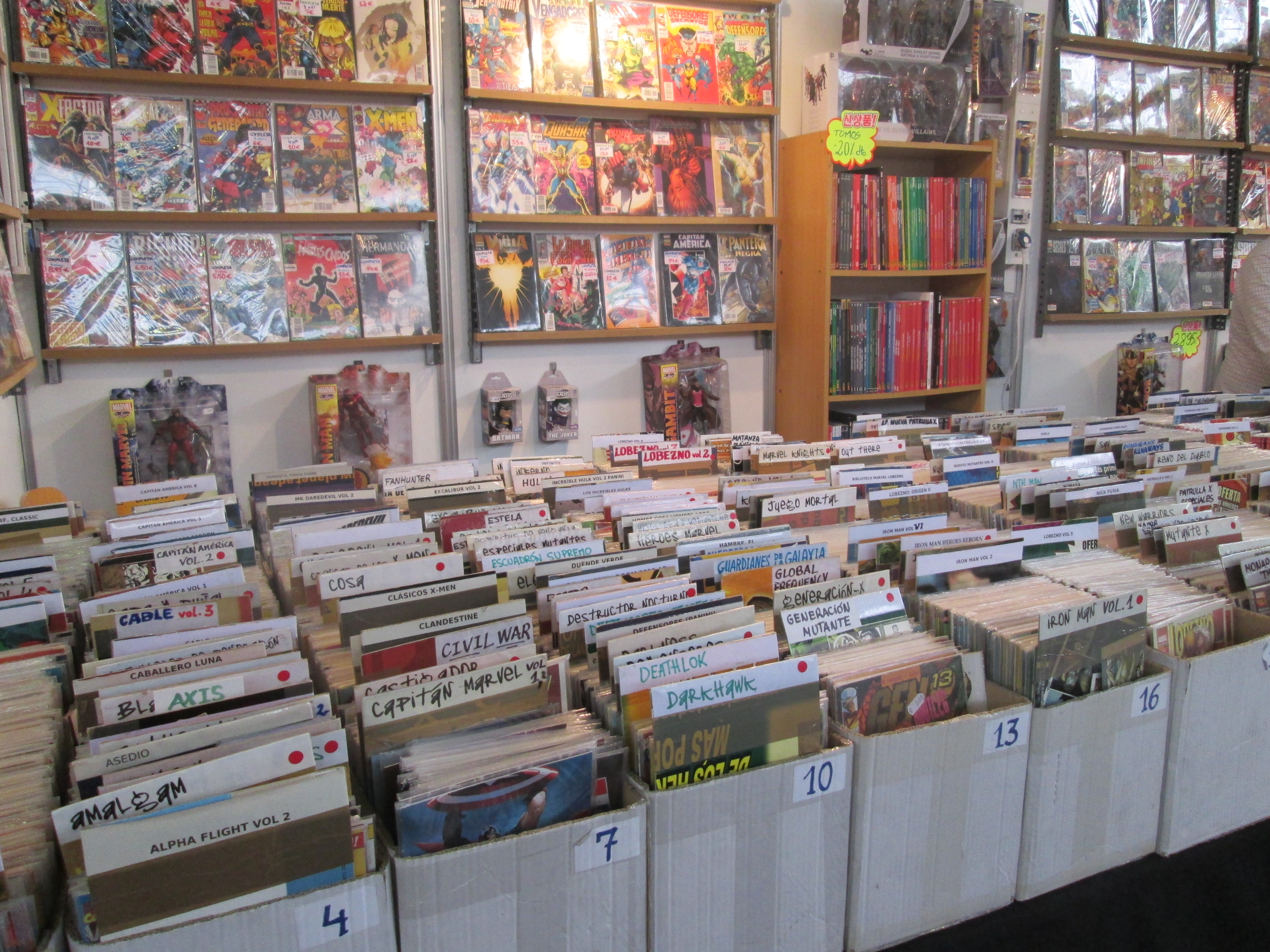 Parada de còmics al Saló Internacional del Còmic de Barcelona